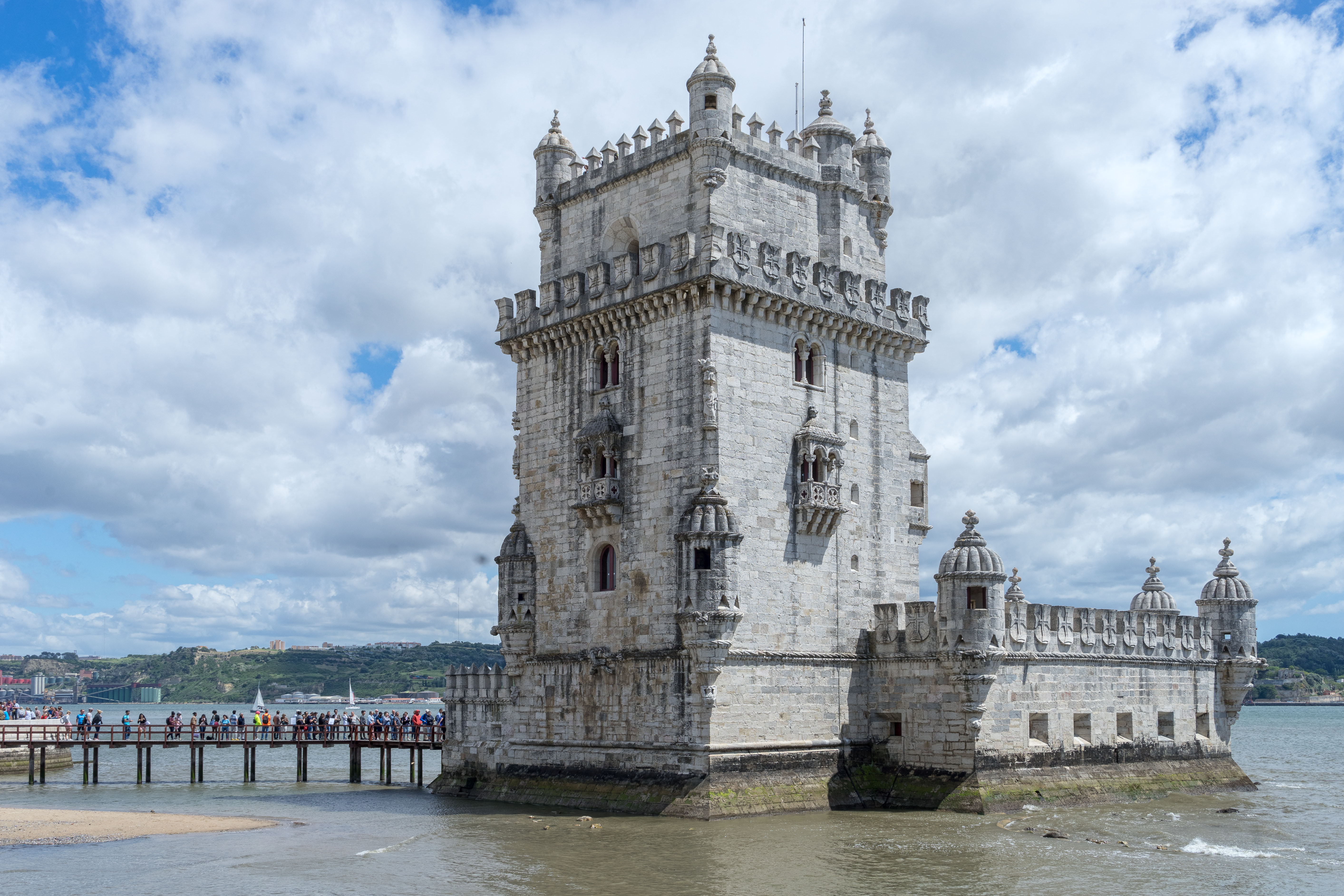 Lisbonne - Tour de Belem